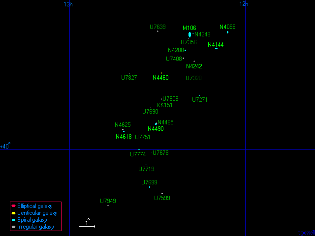 Gruppo Canes II